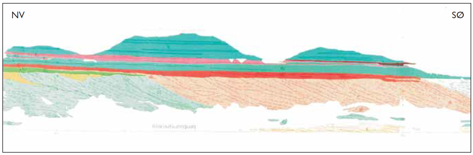 Fotogrammetrisk udtegnet profil langs den sydvestlige kyst af Nuussuaq, gennem lavabænke, som mod højre er løbet ud i en sø og har dannet stejtstillede foreset-strukturer; 6,8 km langt og 1,4 km højt